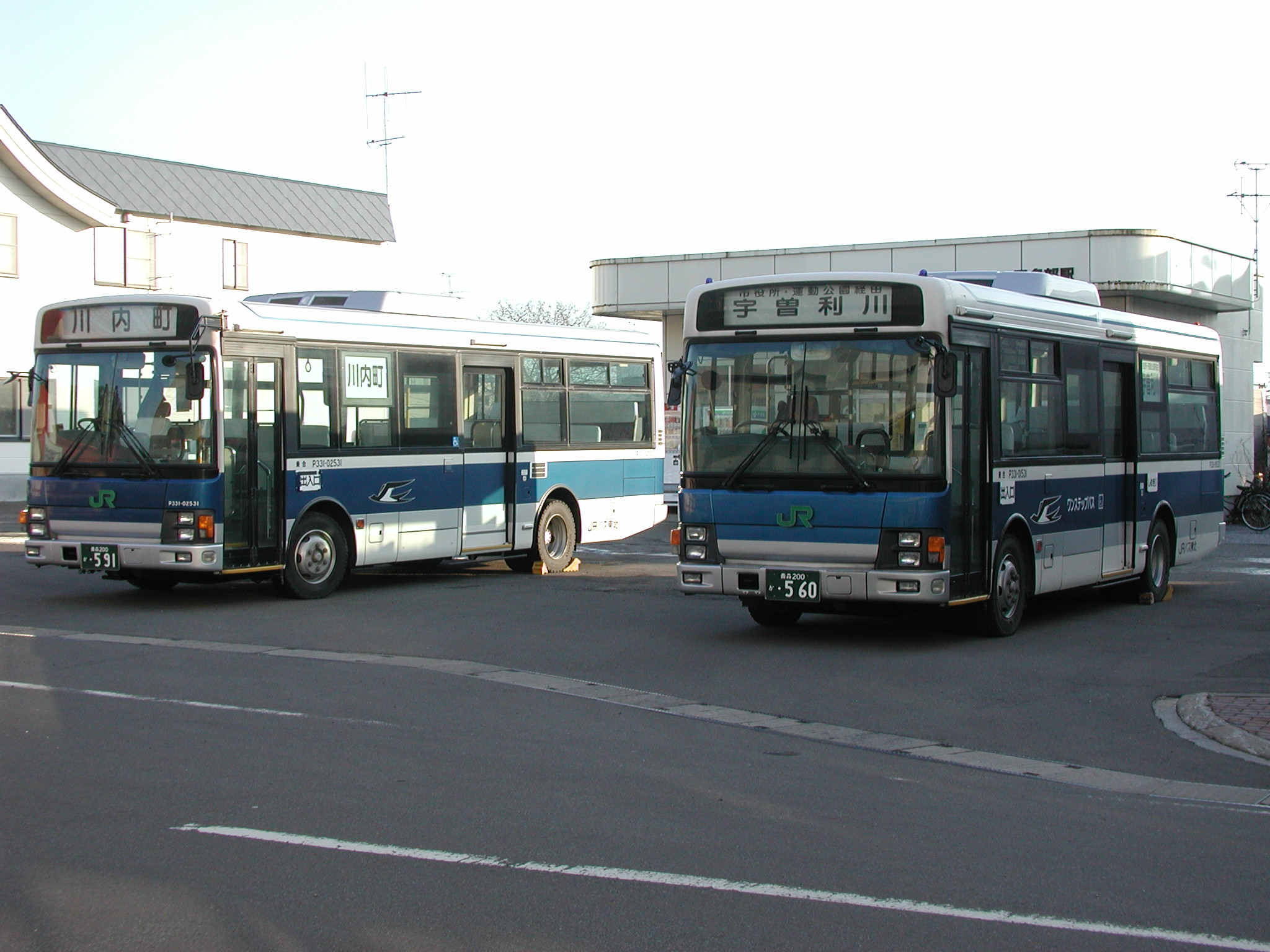 ジェイアールバス東北「下北本線」のバス（一般路線塗装/いすゞ・エルガミオワンステップ(社番：左 P331-02531、右 P331-01531 いずれもKK-LR233J1)）